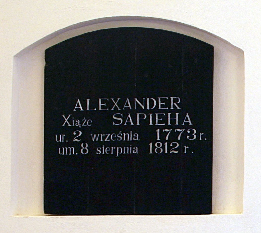 Zamek w Krasiczynie,grobowiec Aleksandra Sapiehy